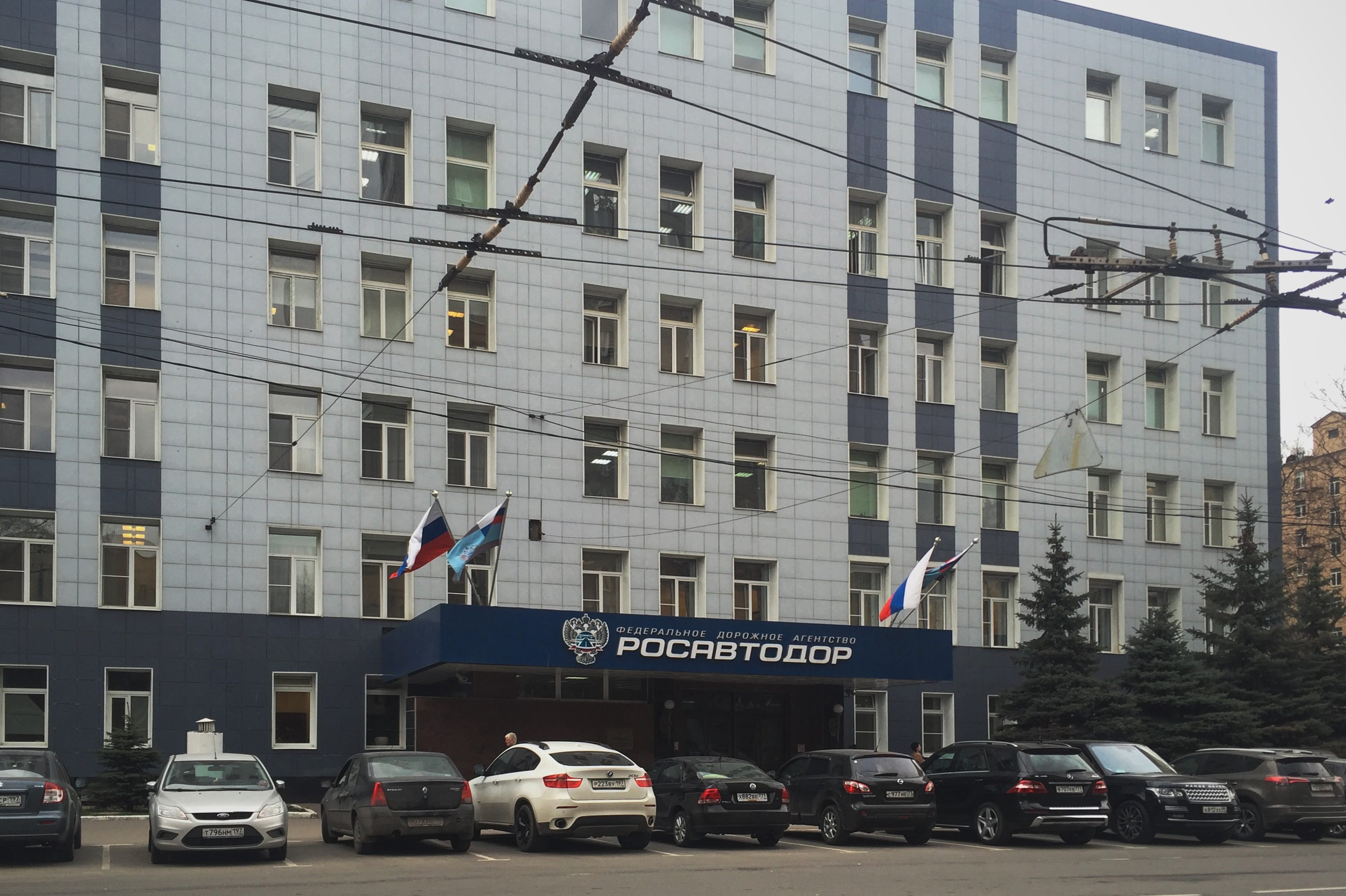 Улица Бочкова, 4. Федеральный Росавтодор.